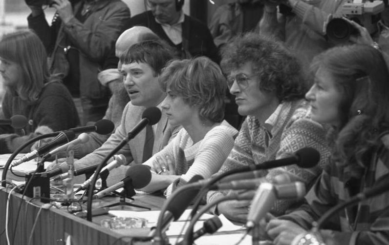 Pressekonferenz der "Grünen" zum Ausgang der Bundestagswahl vom 6.3.1983- im Saal der Bundespressekonferenz.